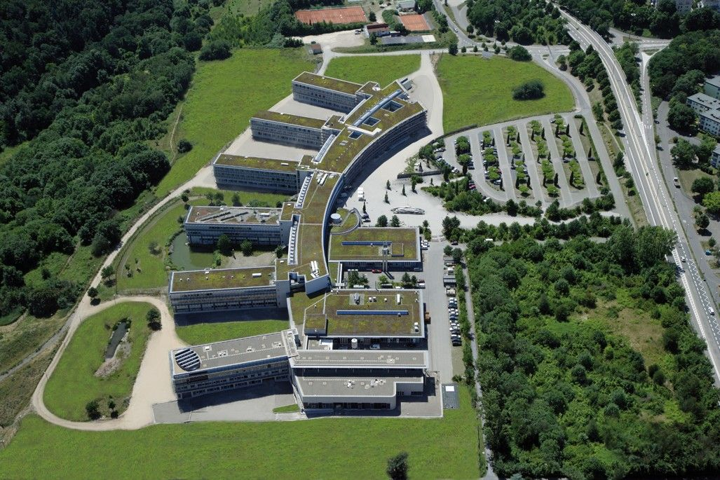 RheinMoselCampus von oben